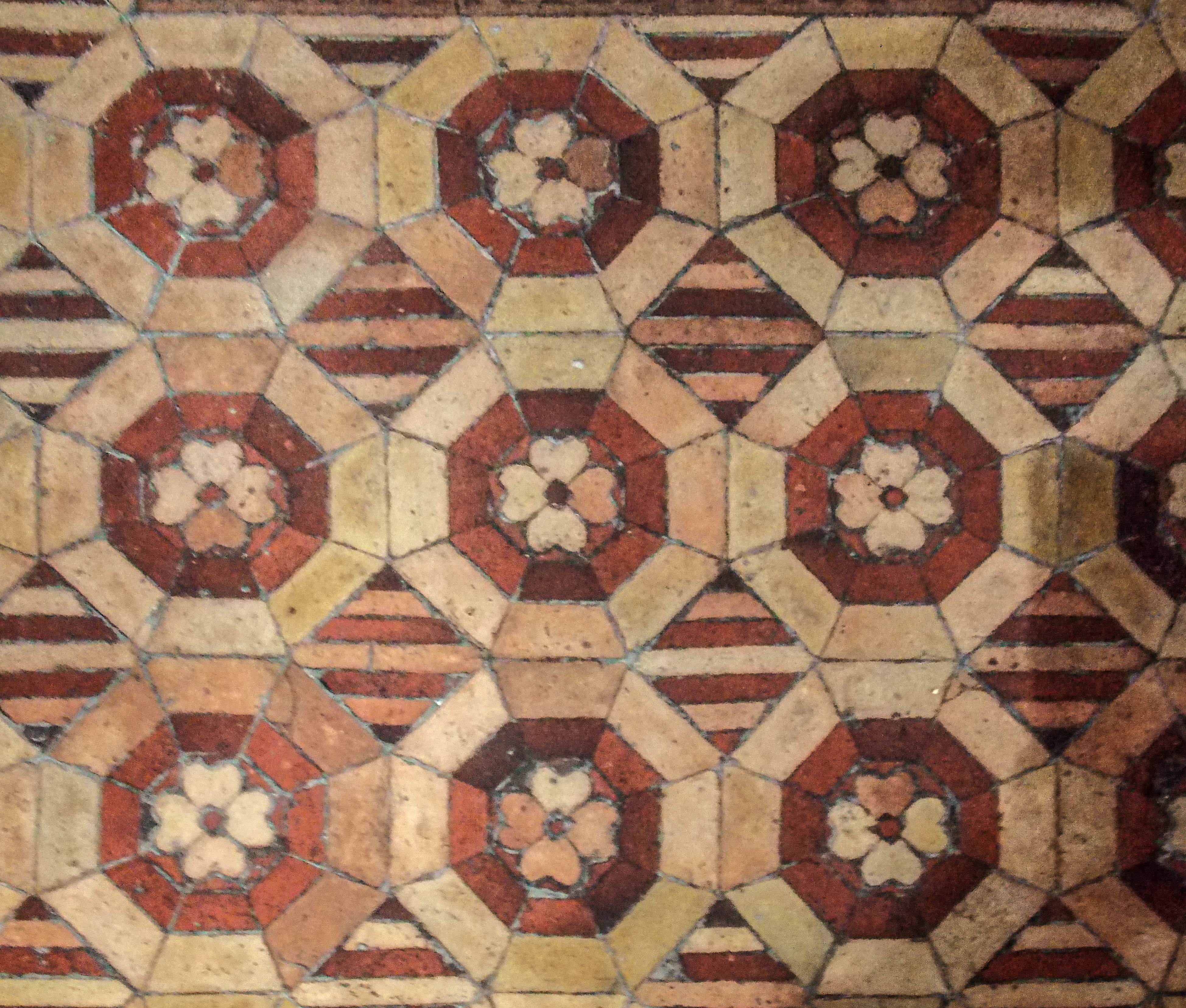 Il santuario della Madonna del Taburno a Bucciano (BN)